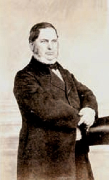 Retrato del pintor Francisco Javier Parcerisa, obra del fotógrafo francés J.Laurent.